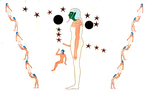 Représentation de clepsydre dans la tombe de Tausert et Setnakht, mur J1